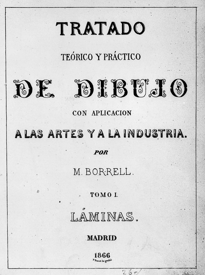 Portada del volumen 1 de Tratado Teórico y práctico del dibujo con aplicación a las artes y a la industria, obra de Mariano Borrell y Folch.